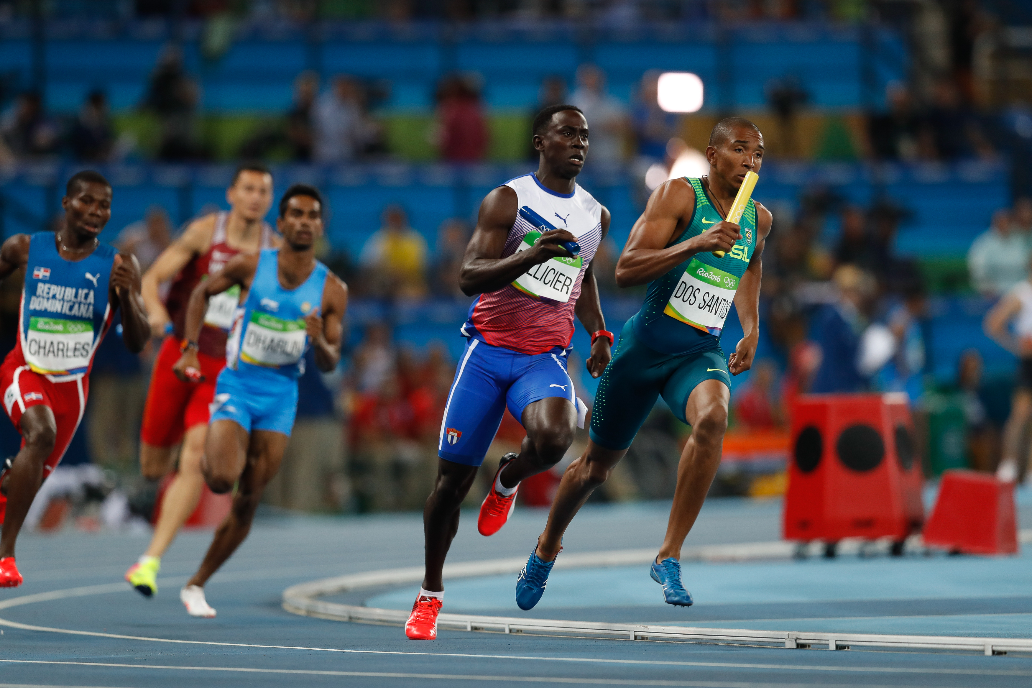 Rio de Janeiro - Eliminatórias do revezamento 4 x 400m nos Jogos Rio 2016, no Estádio Olímpico (Fernando Frazão/Agência Brasil)